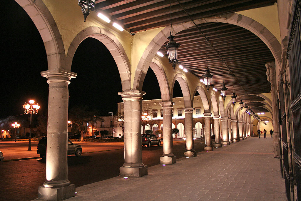 Portales de Zambrano, museo de durango